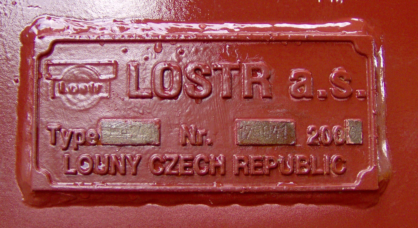 Výrobní štítek "LOSTR a. s. LOUNY CZECH REPUBLIC, 2006" na železničním výsypném voze ř. Tadgnss typ 434.1. Snímek pořízen v závodě LOSTR, Louny.